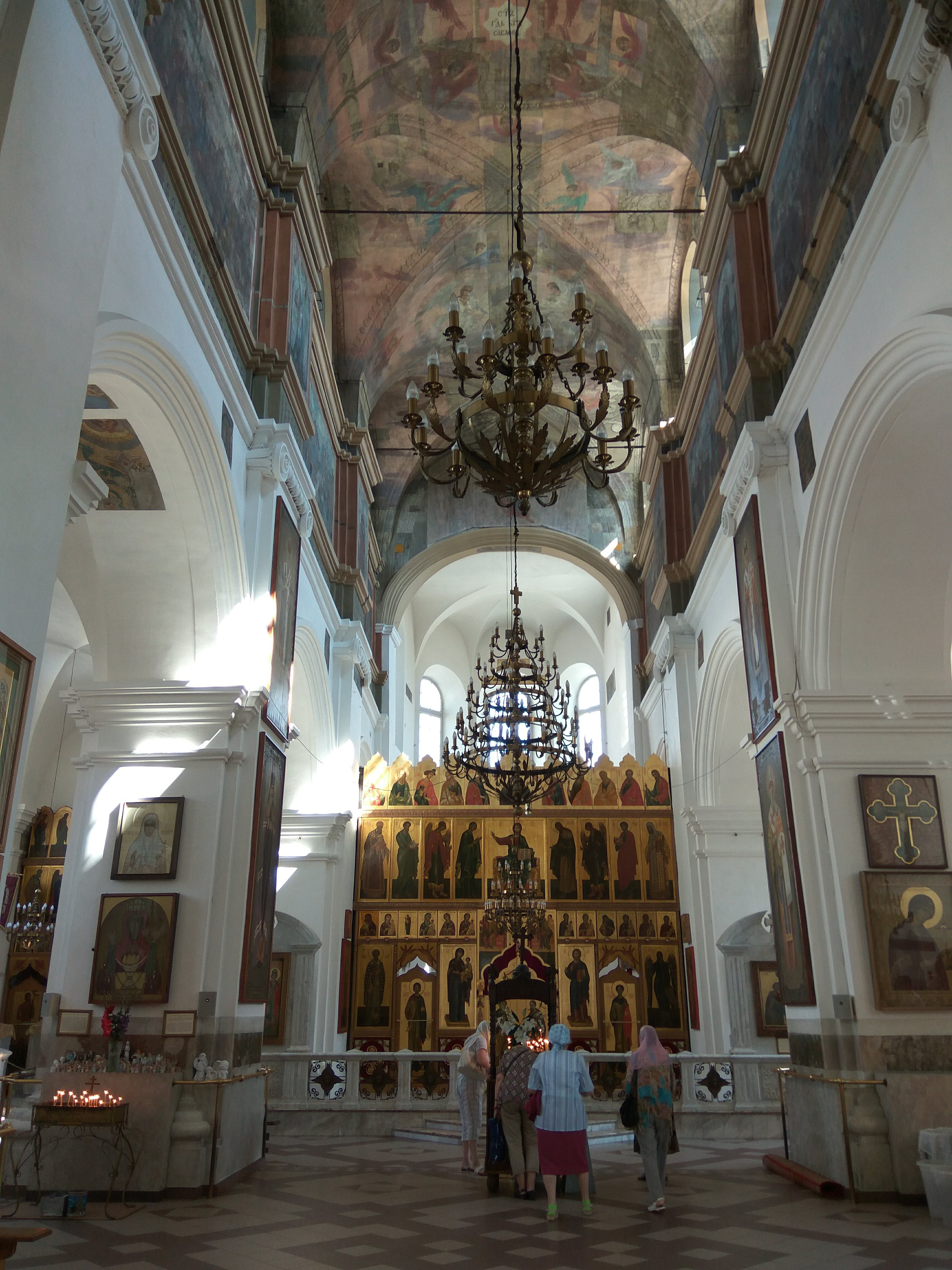 Мінск. Петрапаўлаўская ў жніўні 2018